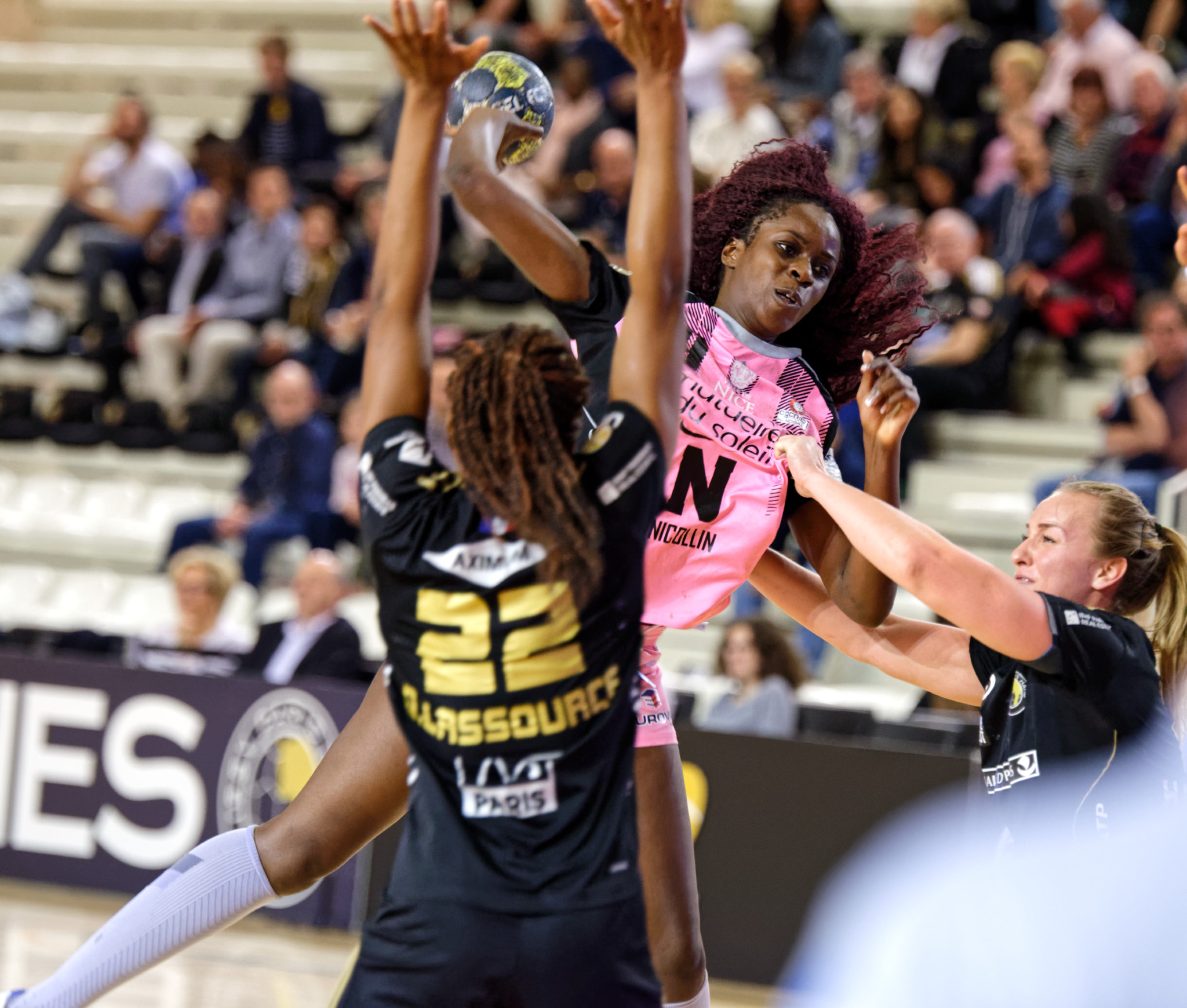 Rencontre de championnat entre Issy Paris Hand et OGC Nice. A Issy Les Moulineaux, le 2 février 2017.